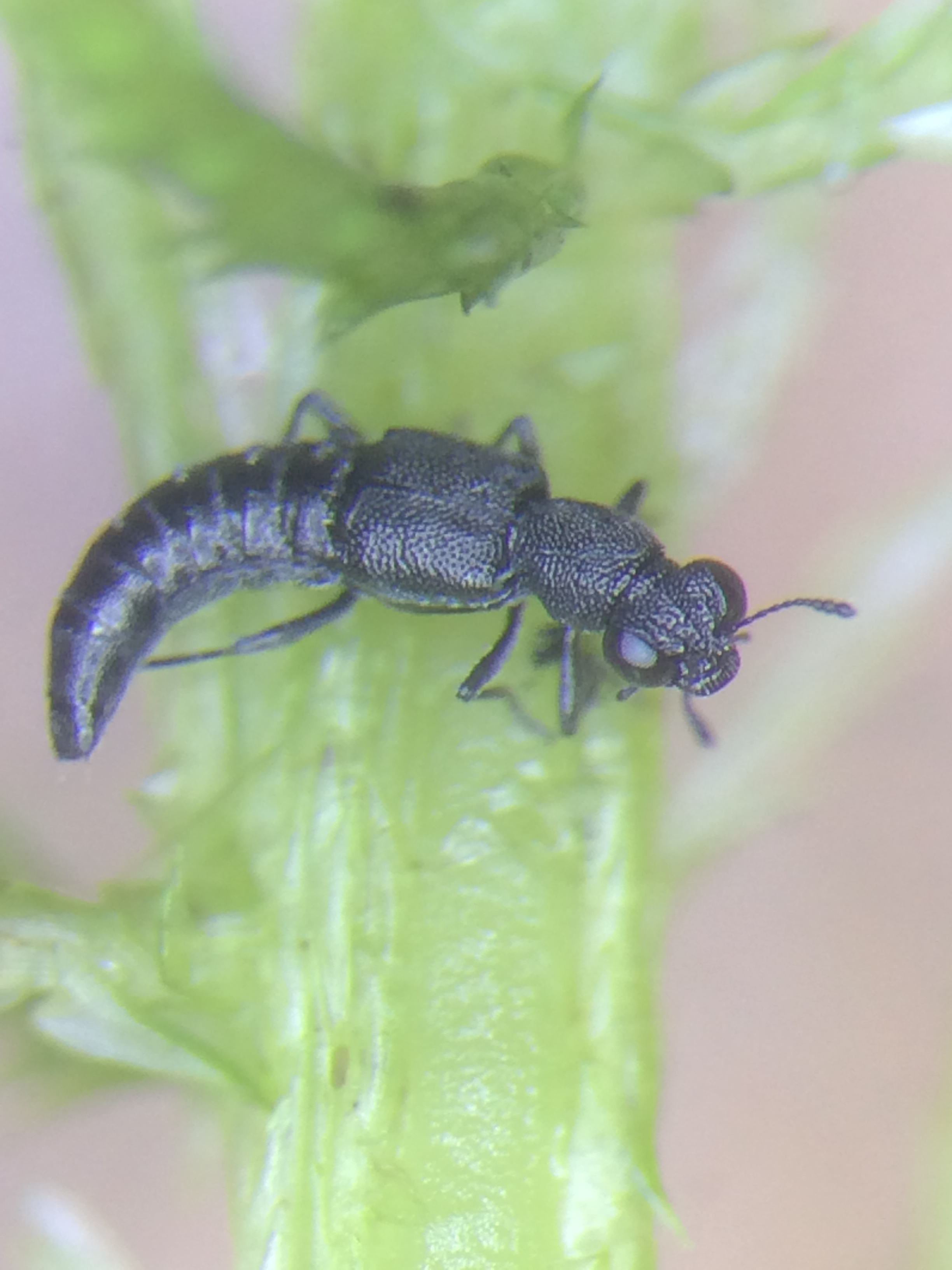 Stenus ampliventris on Sphagnum sp.